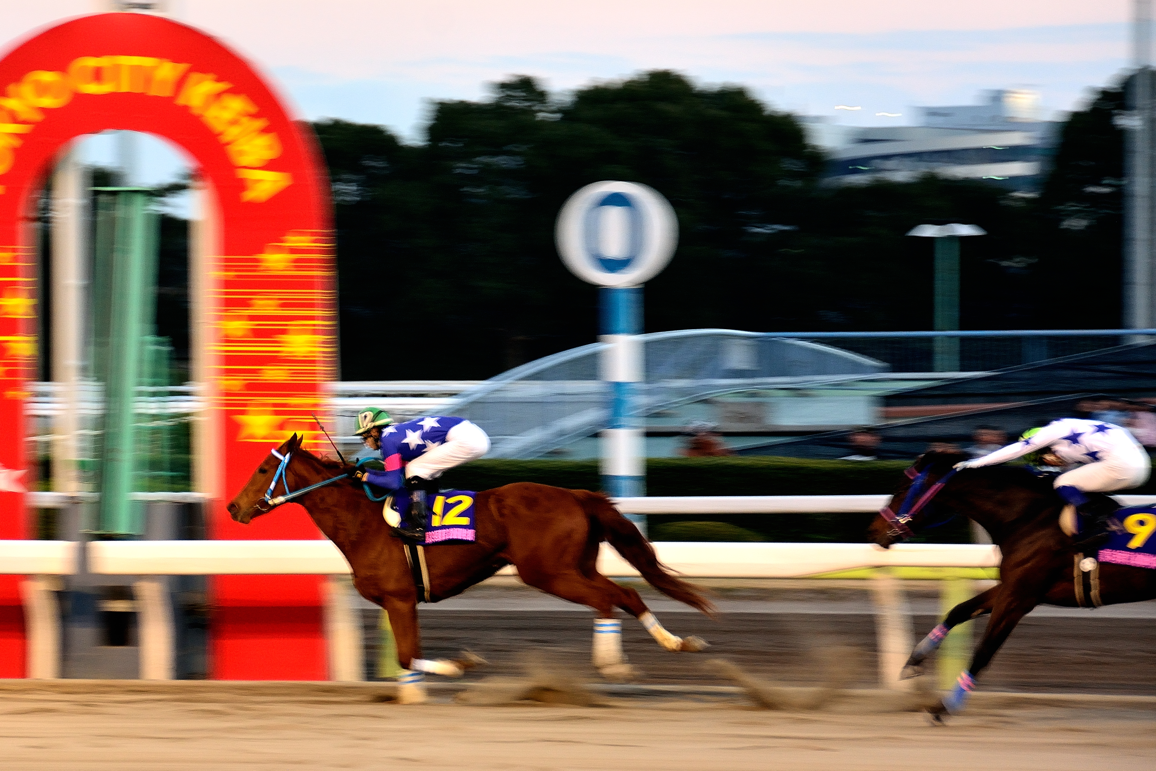 2015年12月31日に大井競馬場の第10競走で行われた「第39回東京2歳優駿牝馬」で、ゴールする瞬間の12番モダンウーマンを、観客席から撮影したもの。